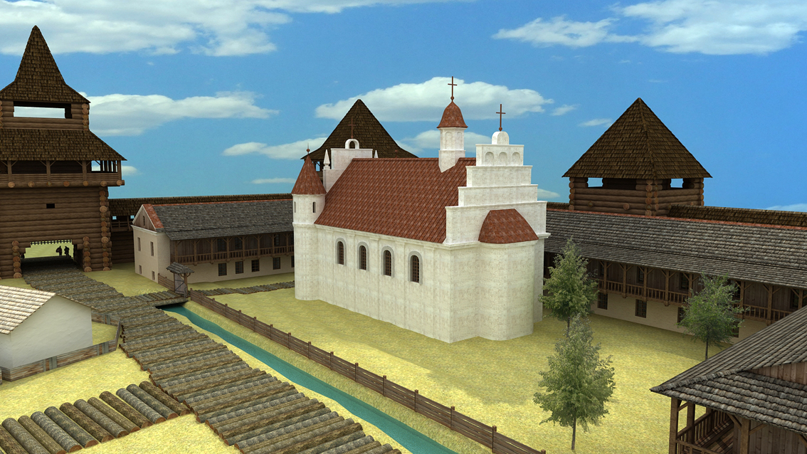 Кафедральний костел Святої Трійці та монастир шариток у Луцьку XVI ст. Реконструкція Авраменко Д.К.